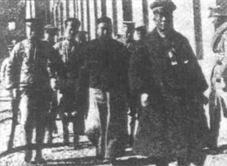 1926年，武昌守城的直军将领刘玉春（穿长袍者）被活捉